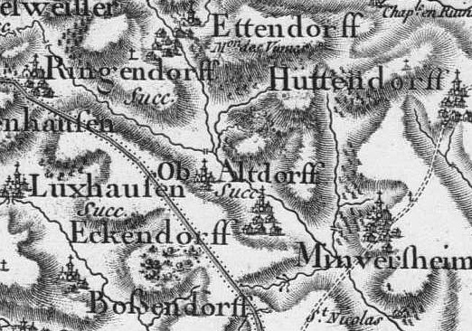 Carte de Cassini. Vue sur la zone d'OberAltdorff et Eckendorff (Alteckendorf) en Basse-Alsace. Planche noir et blanc n°162